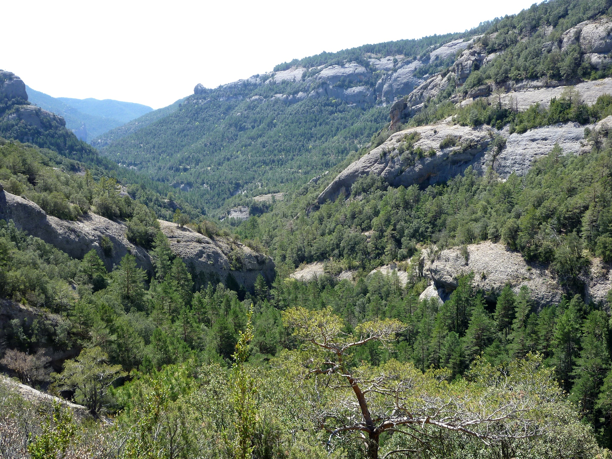 Part mitjana de la Rasa de Torroella, a la Vall de Lord (Solsonès - Catalunya)